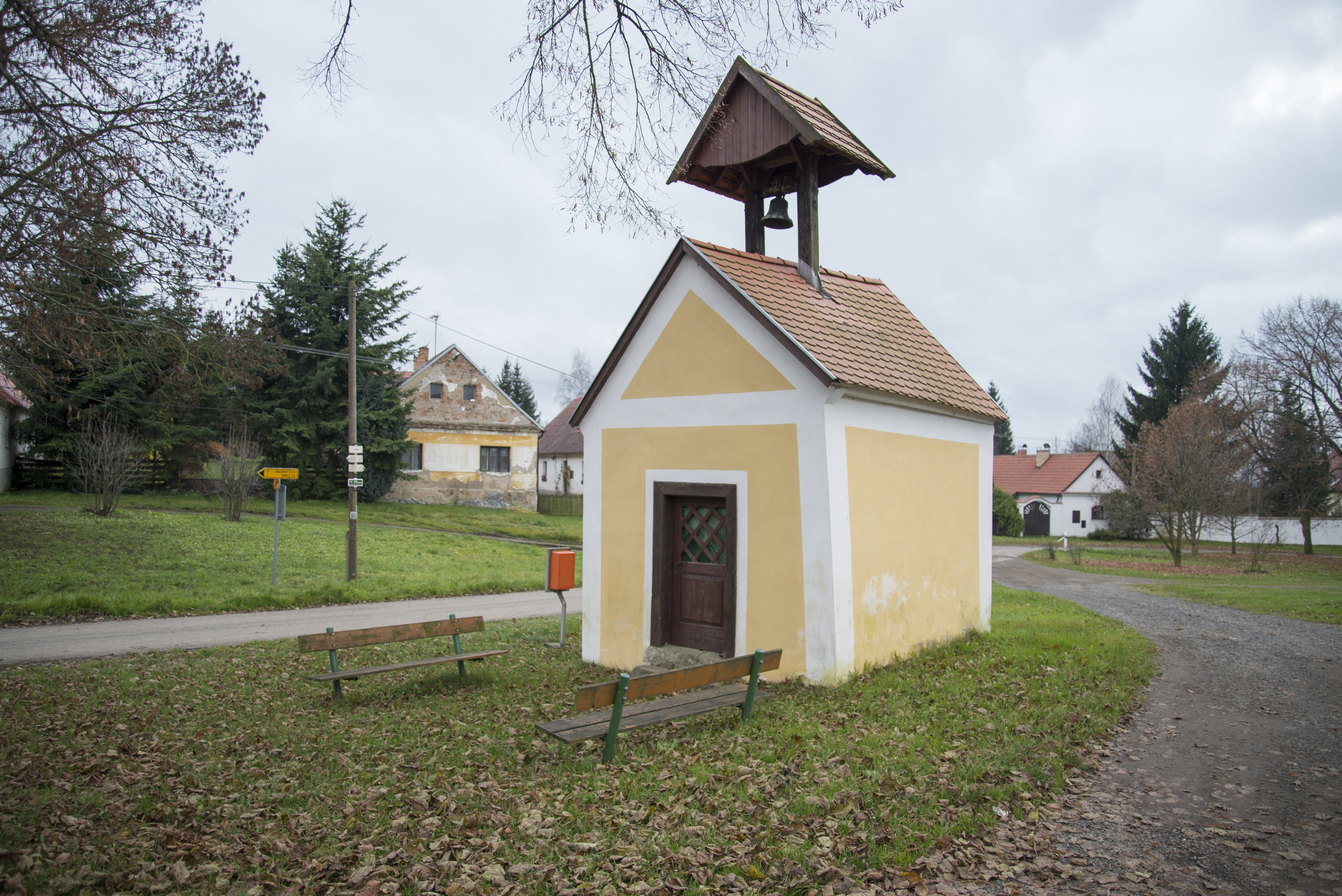 Soseň u Jesenice - zvonička